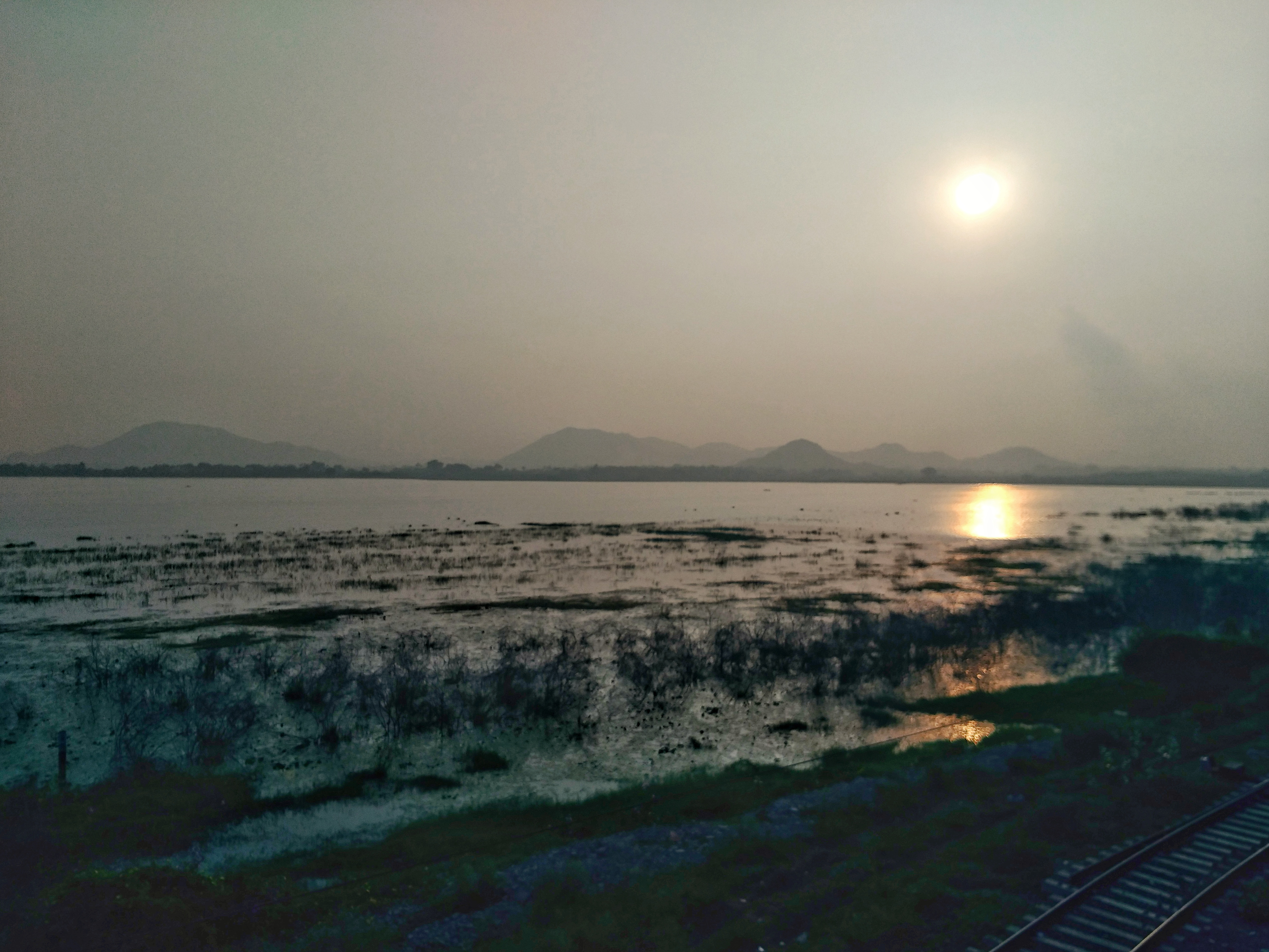 chengalpattu lake panorama shot.